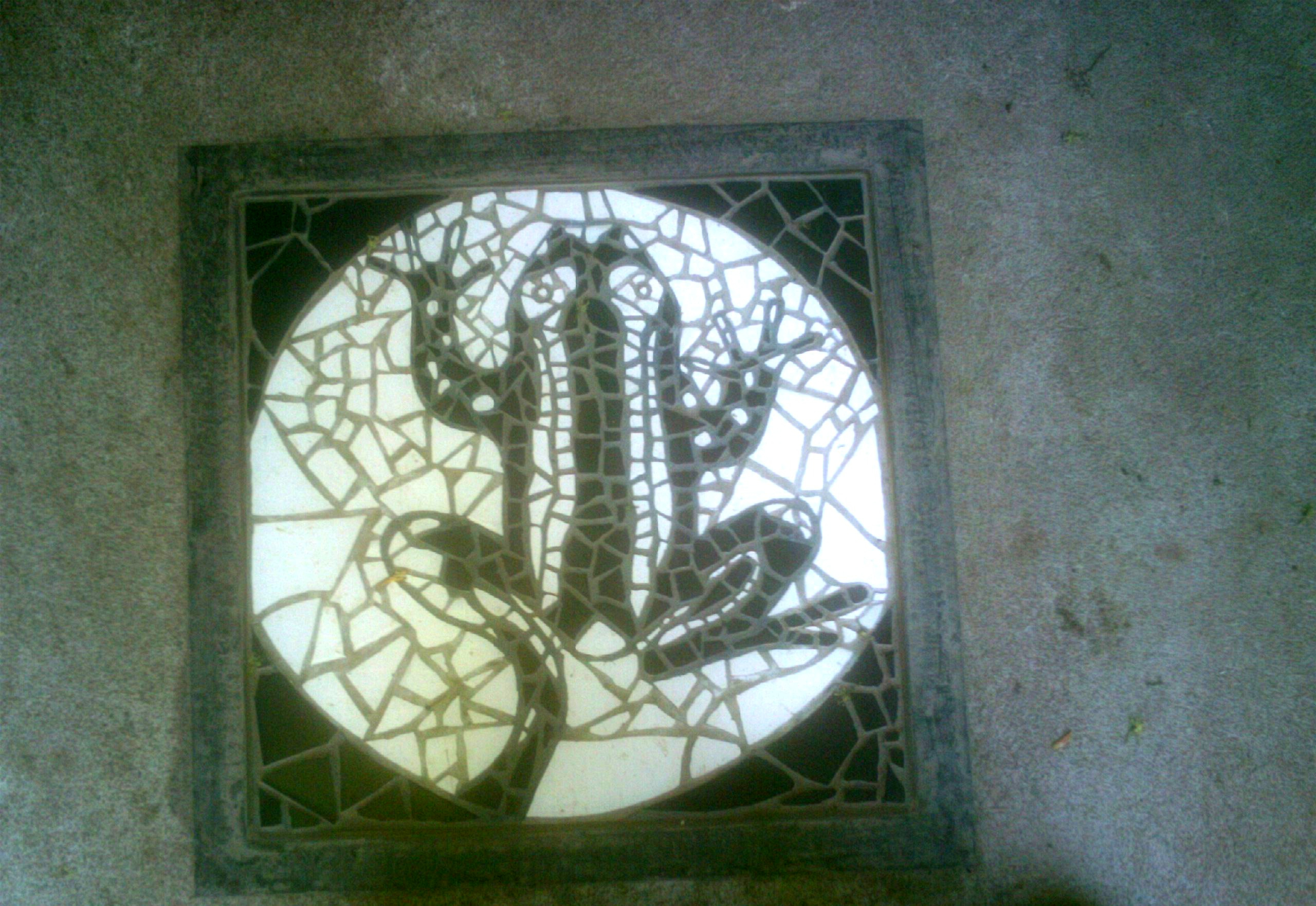 Mosaico de rana en la entrada del Museo de la Exploración Rodulfo A. Philippi, en la isla Teja, Valdivia, Chile.